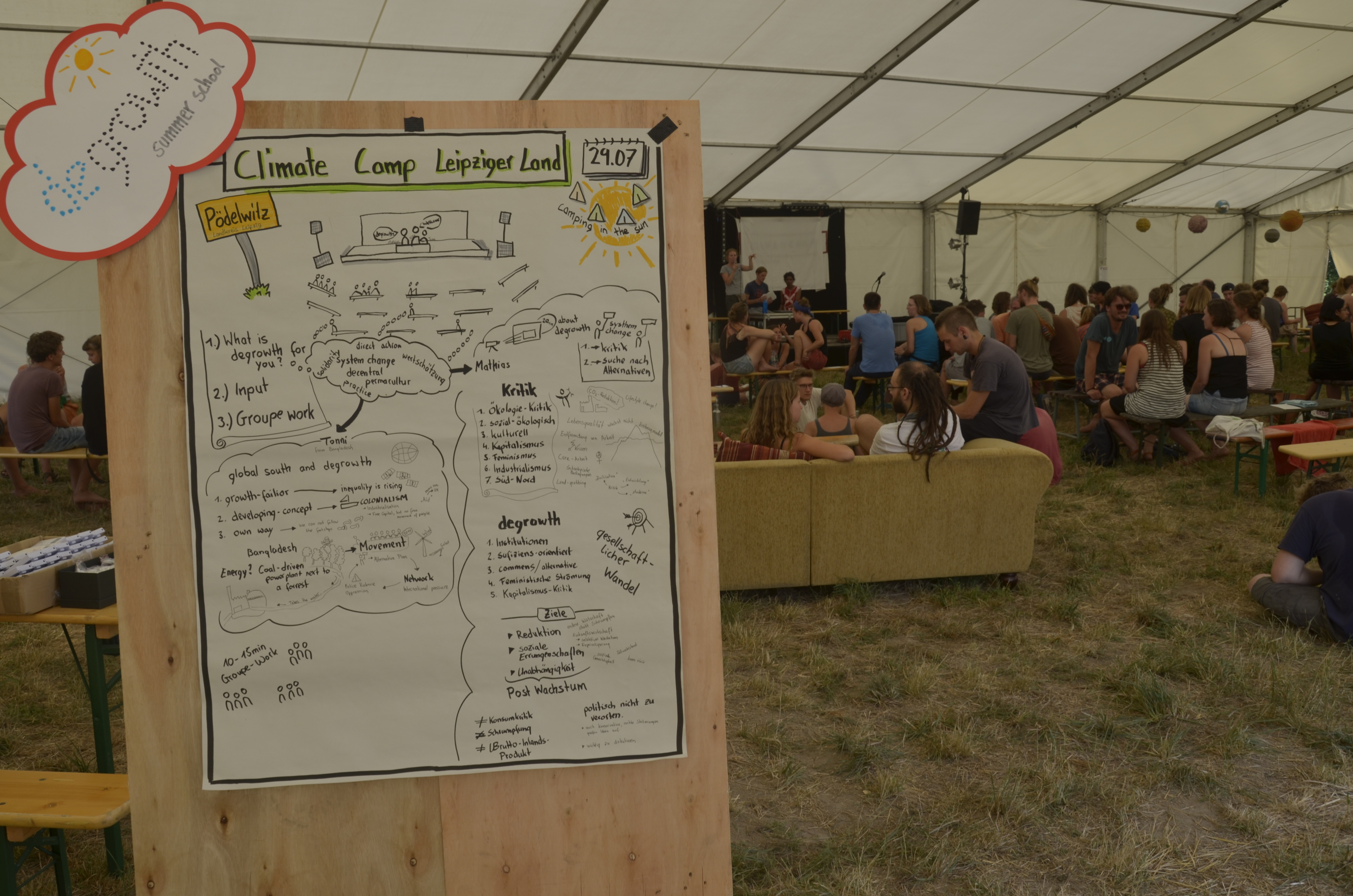 Eröffnung der Degrowth-Sommerschule beim Klimacamp Leipziger Land 2018